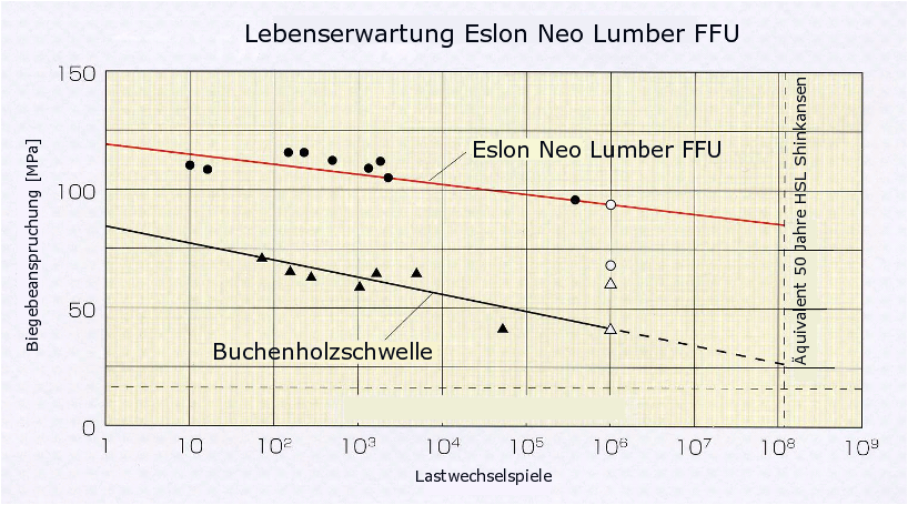 Nach 15-jähriger Testphase wurden FFU Kunsthölzer ausgebaut und weiteren 100 Millionen Lastwechsel unterzogen. Ergebnis die Lebenserwartung kann mit mehr als 50 Jahren hochgerechnet werden